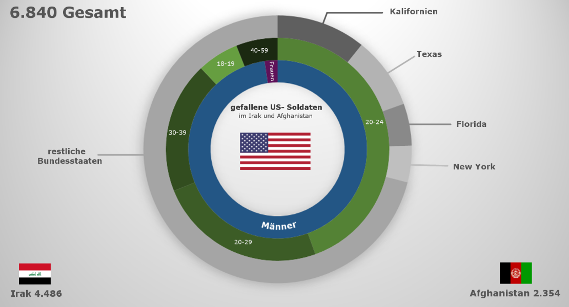 Diese Grafik zeigt das Geschlecht, Alter und die Herkunft der gefallenen US Soldaten in Irak und Afghanistan (Quelle